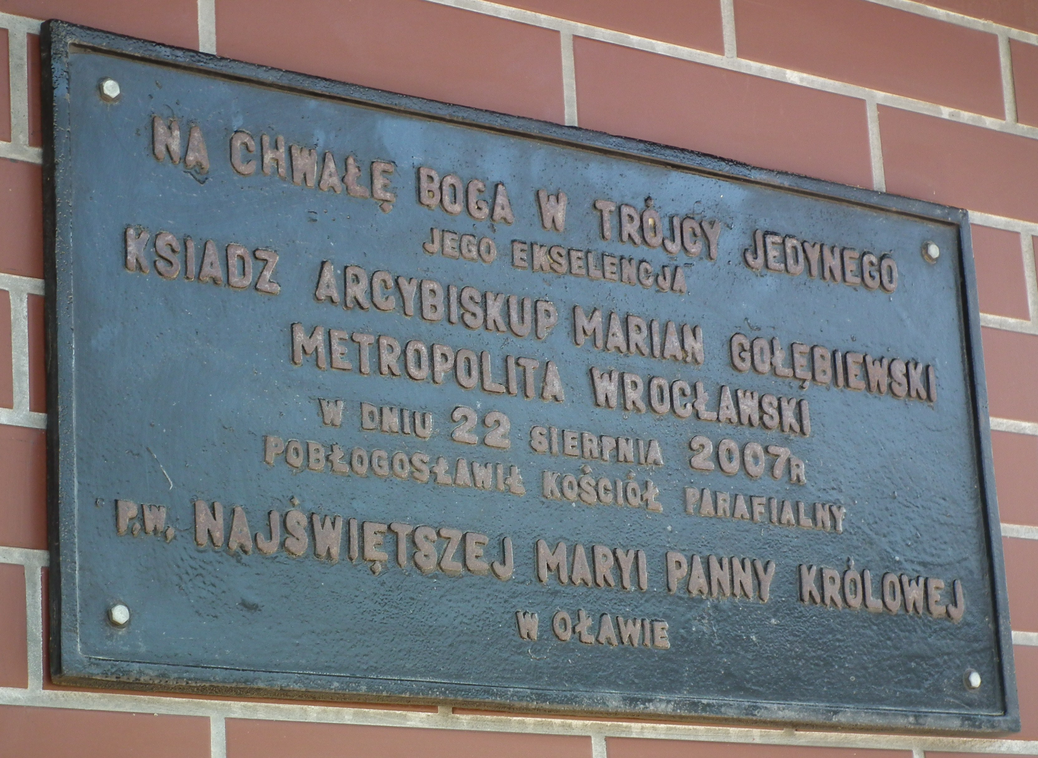 Kościół NMP Królowej w Oławie (dawniej Domańskiego).